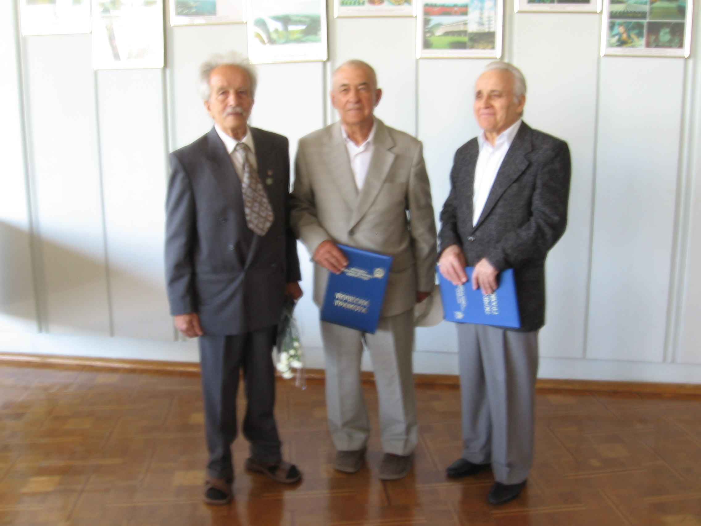 Члени товариства української мови імені Т.Г.Шевченка